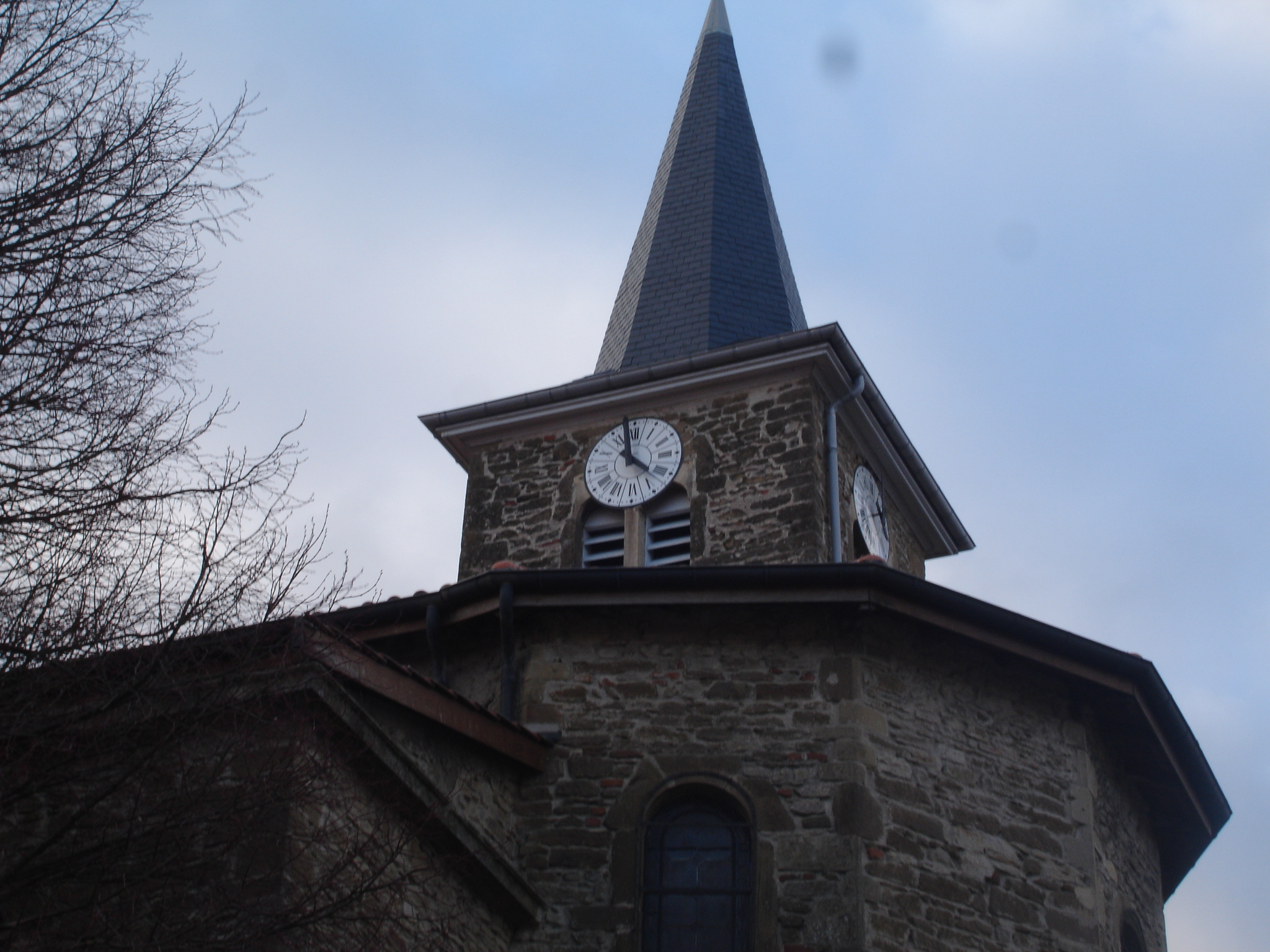 Valencin (38) : le clocher de l'église